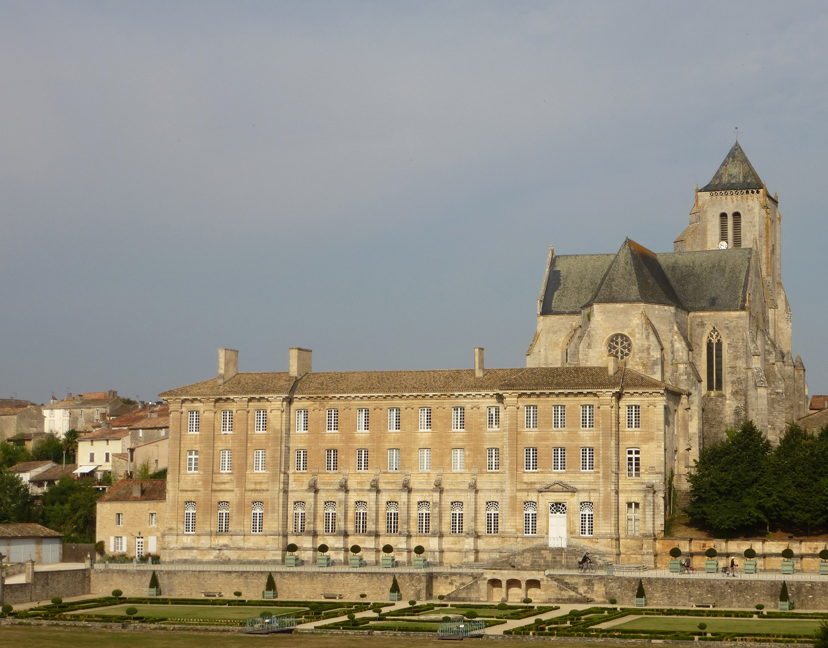 Abbaye royale Notre-Dame, ville de Celle sur Belle, département des Deux-Sèvres, France